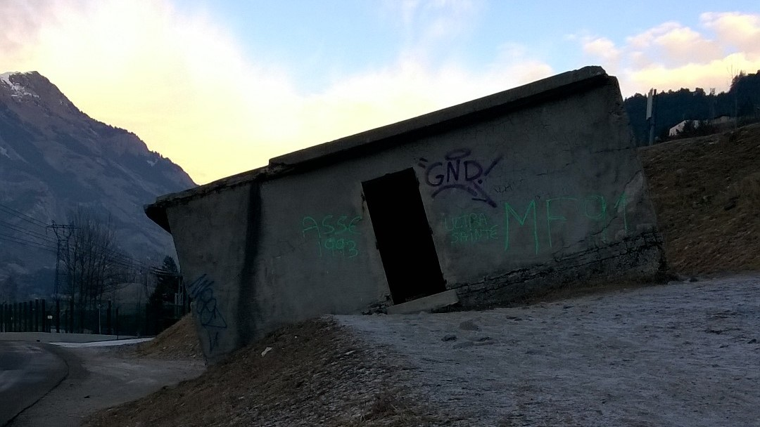 La maison penchée de Modane